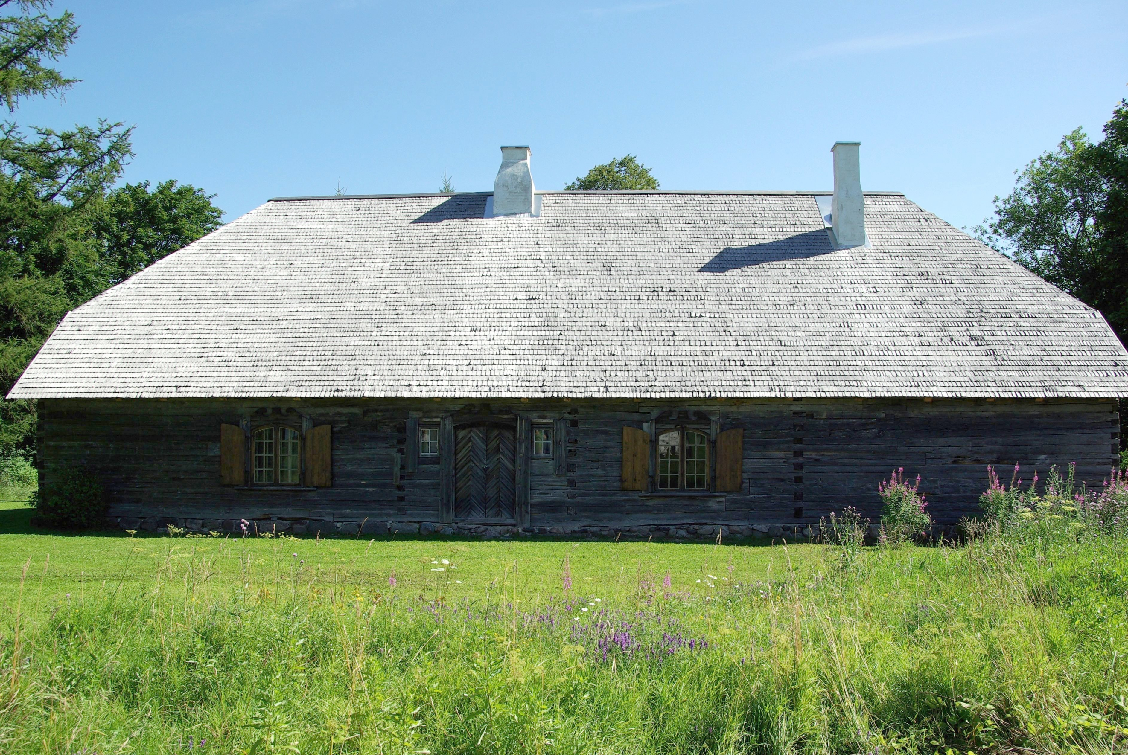 mõis jääb kaasajal Viljandimaale Saarepeedi valla territooriumile.